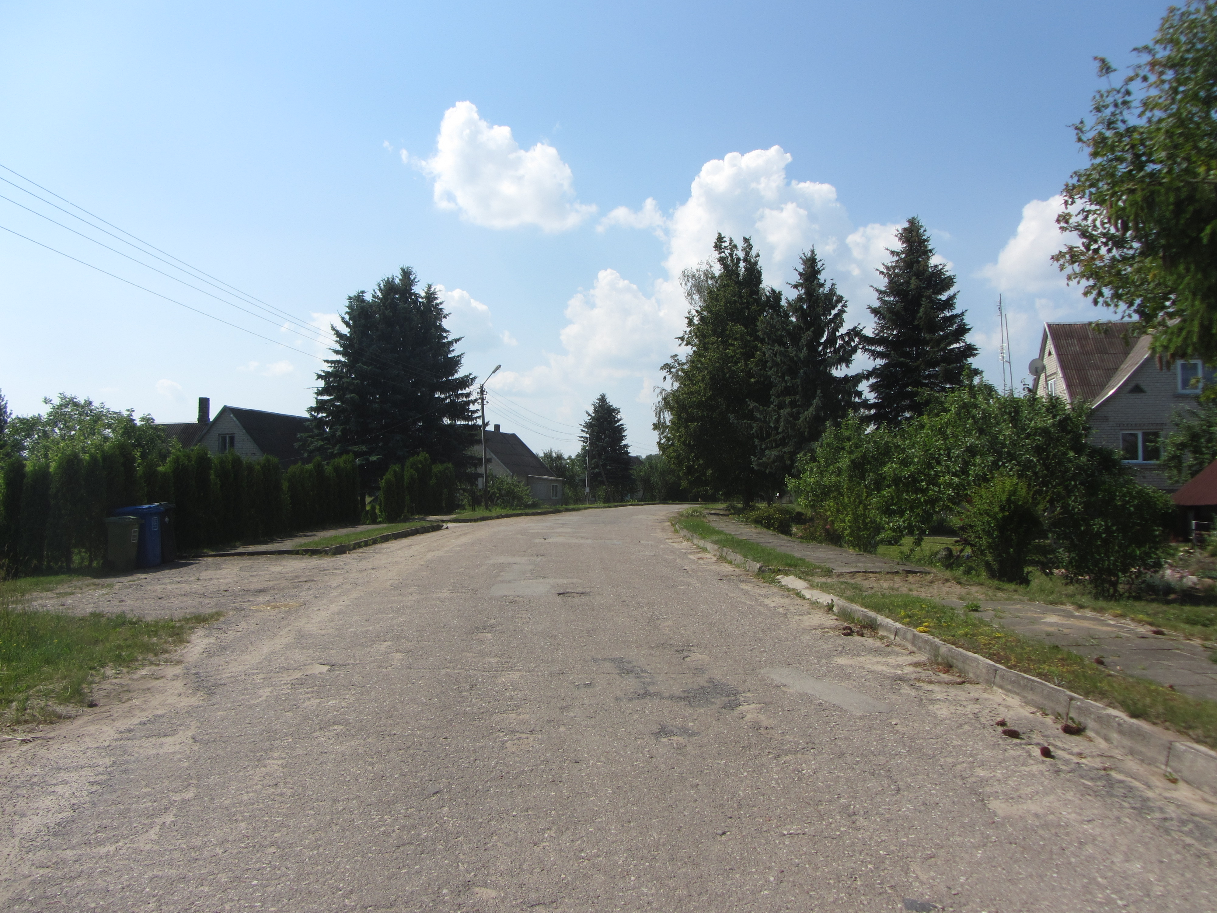 Kukliai, Lithuania